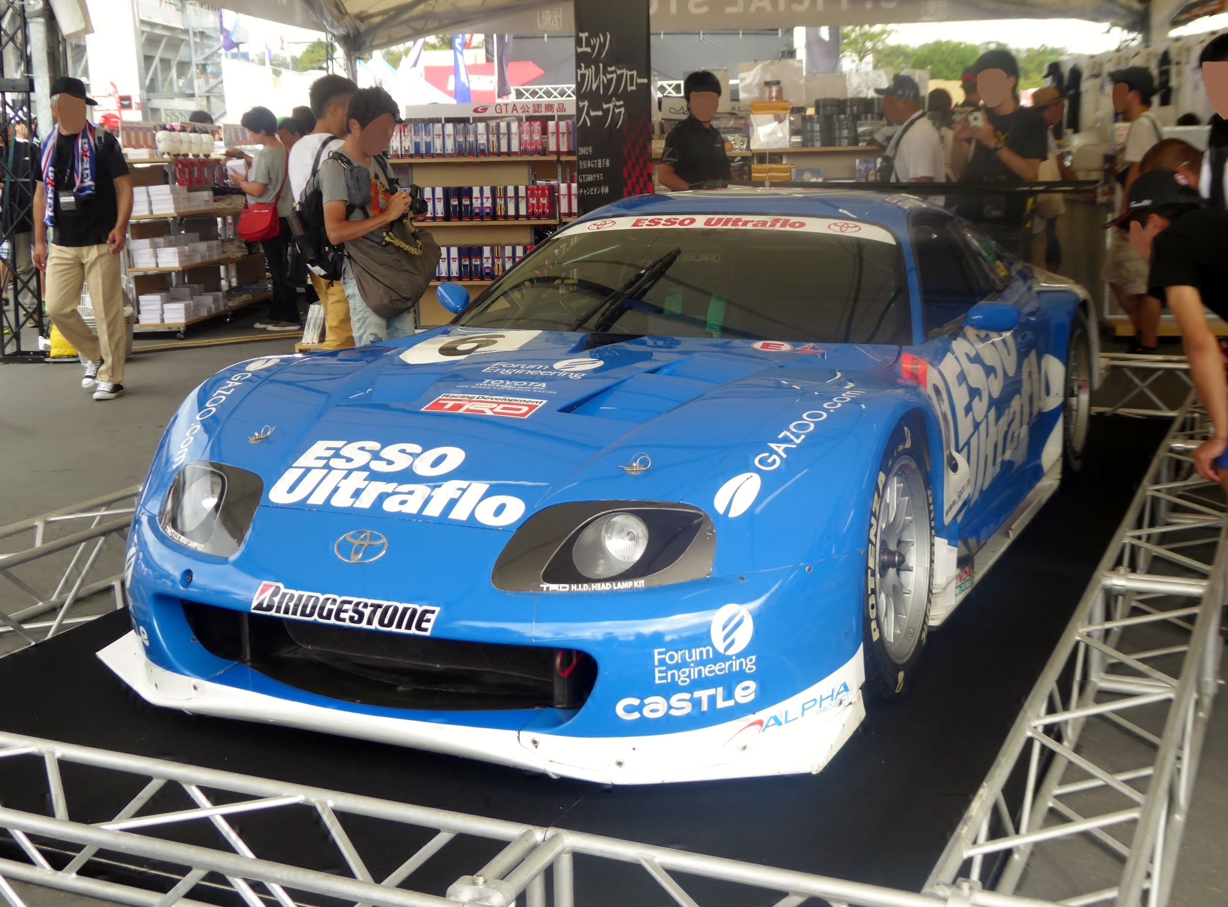 2002年仕様の6号車エッソウルトラフロートムススープラをフロントから撮影。